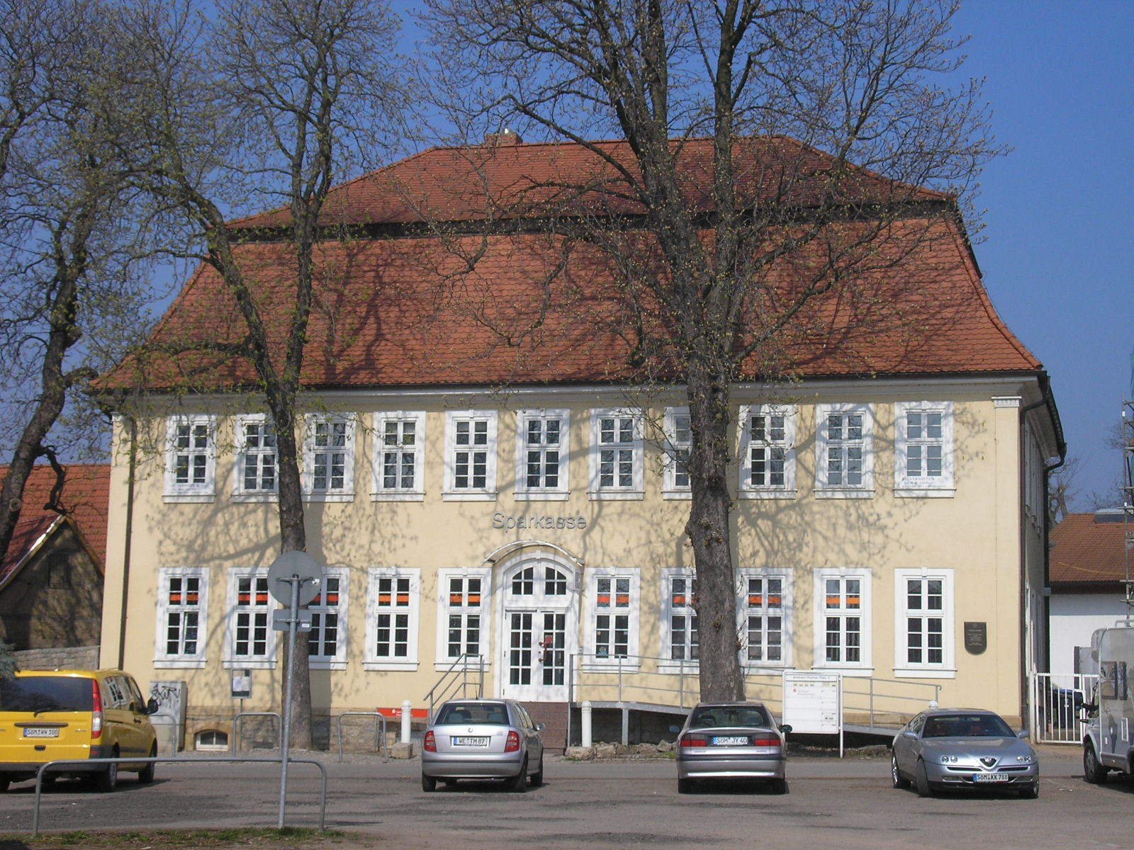 Ein Verwaltungsgebäude am Amtmann-Kästner-Platz (heute Sparkasse) in Erfurt-Gispersleben (Thüringen).